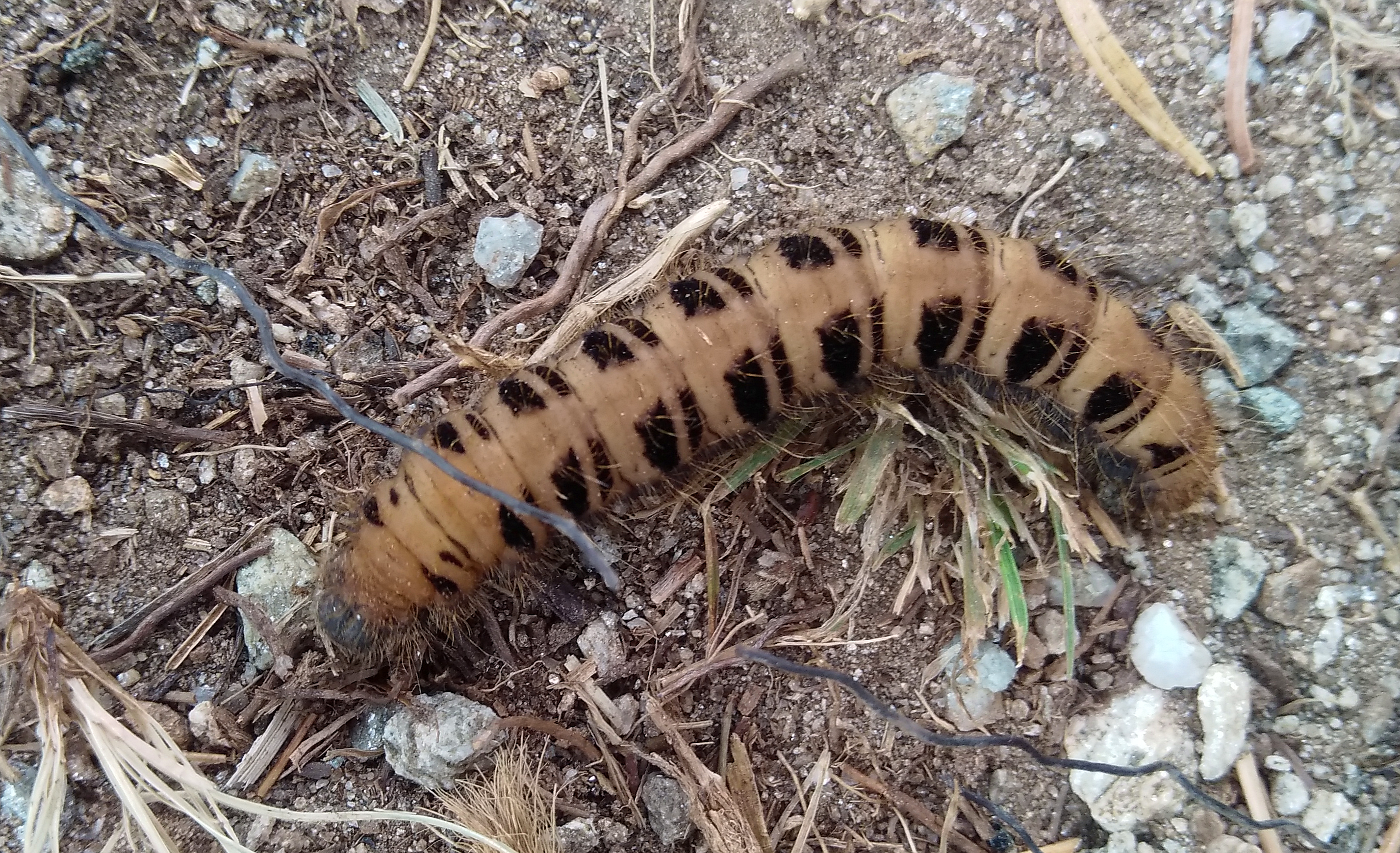 Un bruco di Lemonia sp.' in una delle ultime età larvali (Alpi Lepontine nei pressi dell'Alpe Veglia a circa 1900 m di quota)